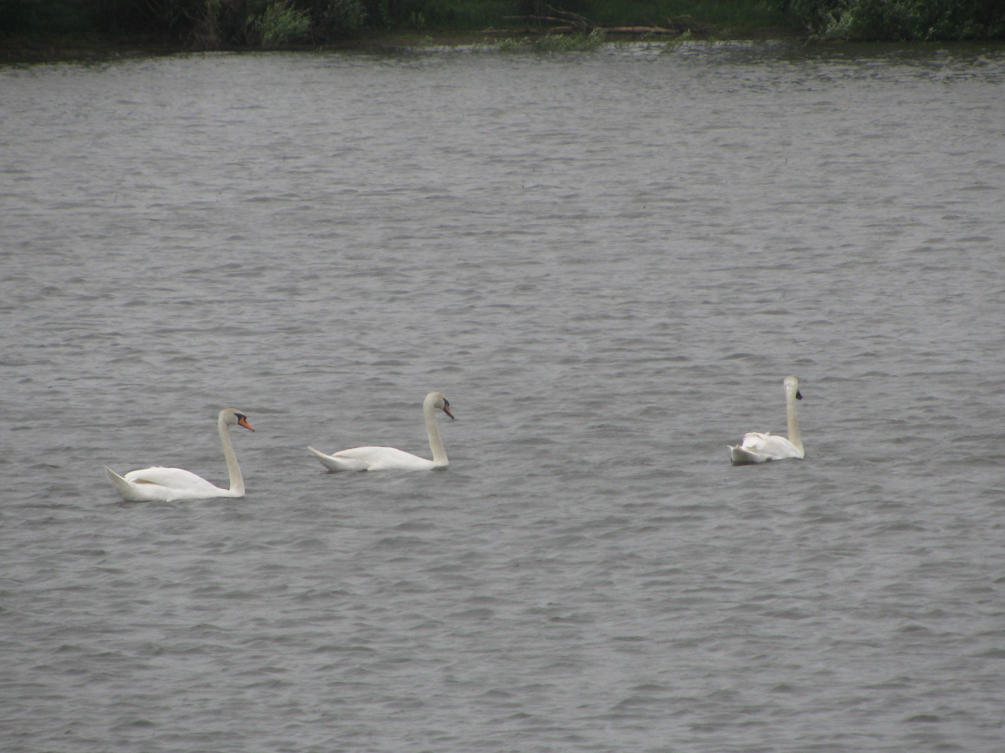 Лебиди на озере Лиман на окраине села Нижняя Добринка, Жирновского района